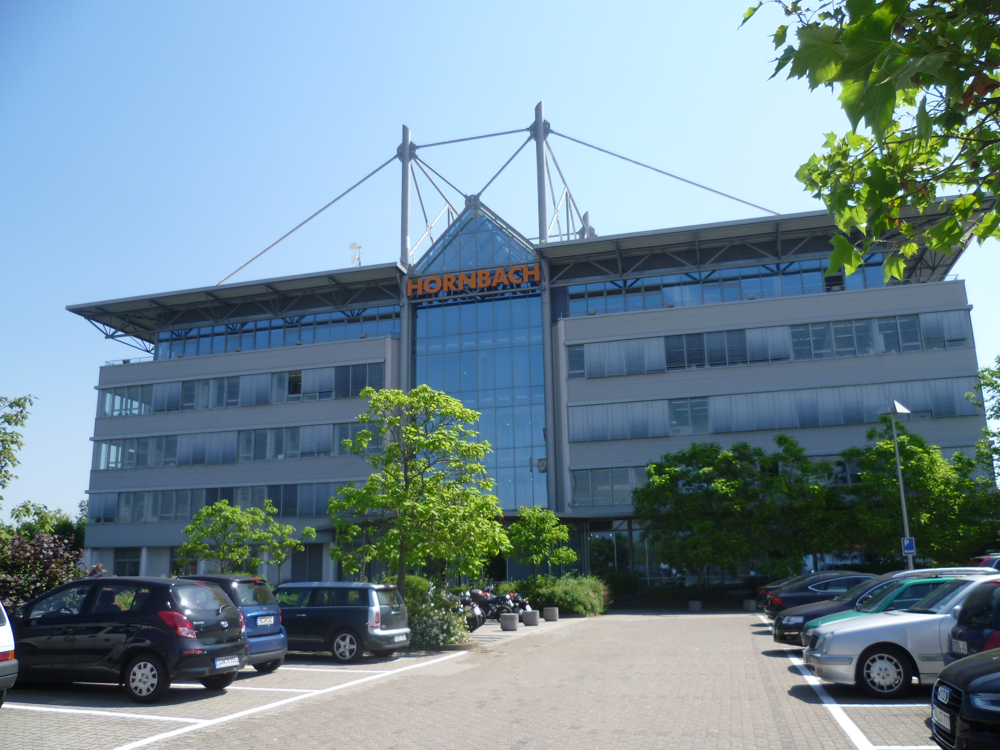 Hauptsitz der Hornbach Holding in Bornheim